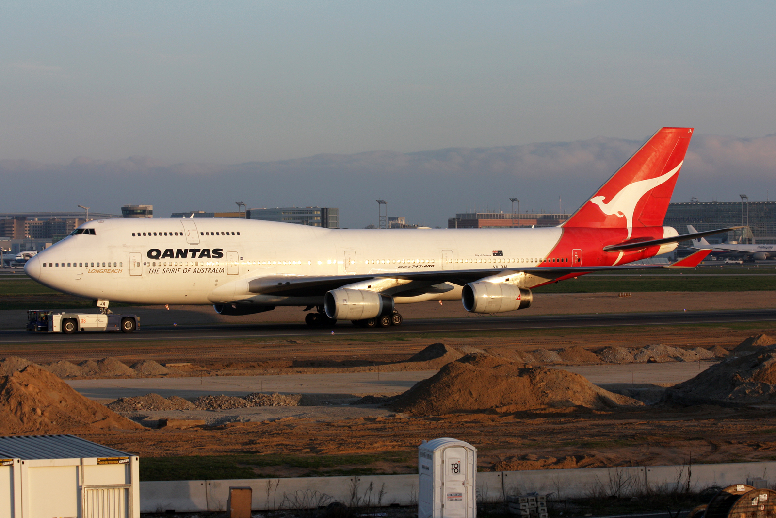 Frankfurt am Main (Rhein-Main AB) (FRA / EDDF / FRF) Germany 4.2011